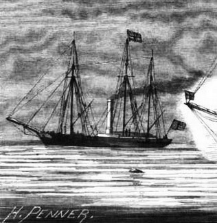 SMS Grille der preußischen Marine vor den Umbauten des Jahres 1886 in einer zeitgenössischen Darstellung.